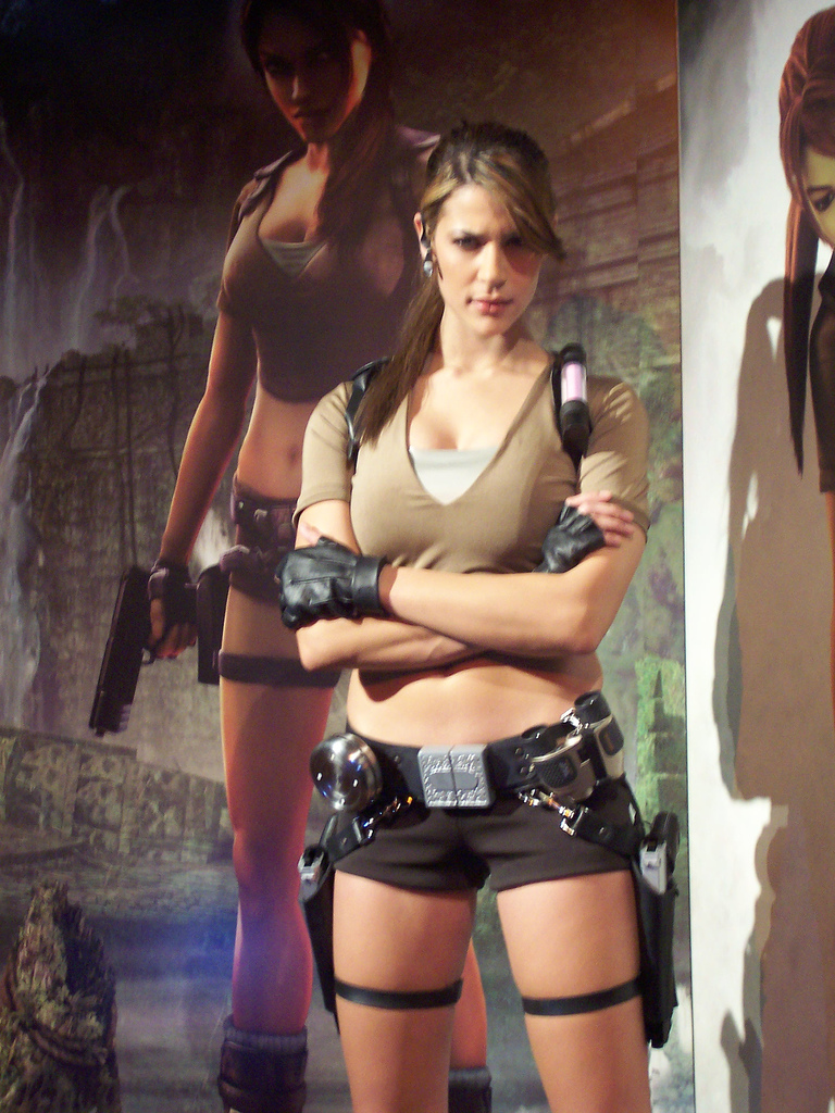 Karima Adebibe posing as Lara Crouft.Karima Adebibe's Lara Croft